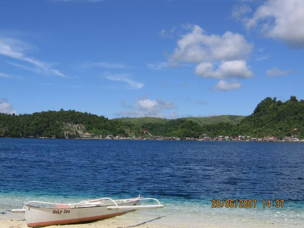 Magsaysay